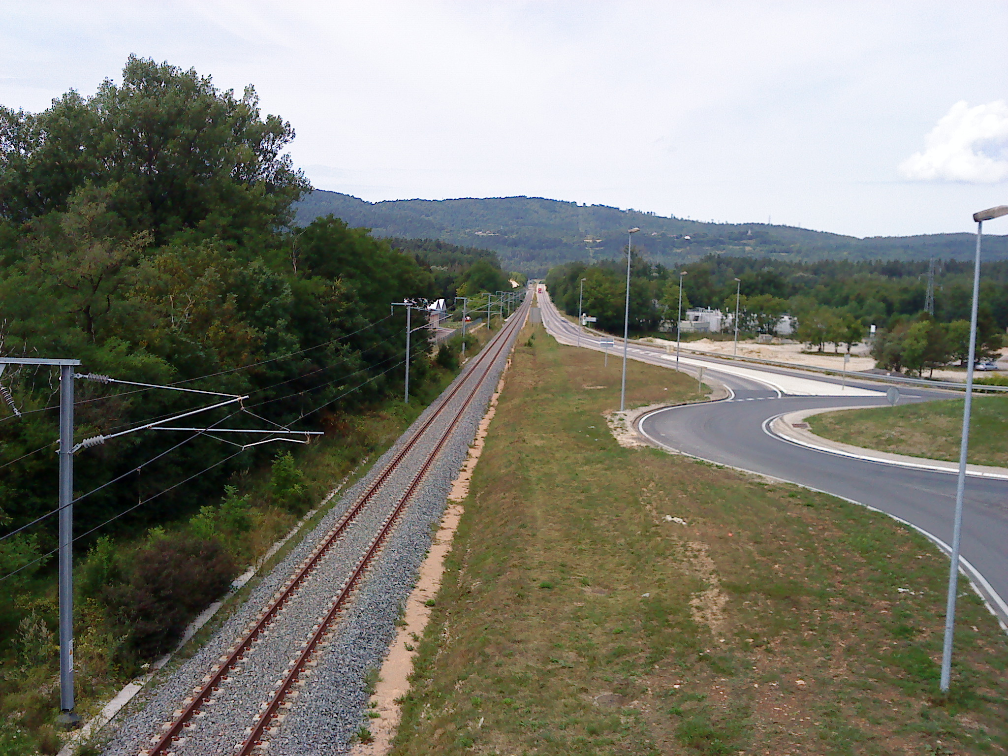 Vue depuis le pont-route remplaçant la PN37 de la ligne du Haut-Bugey, dans le sens Bellegarde-Bourg